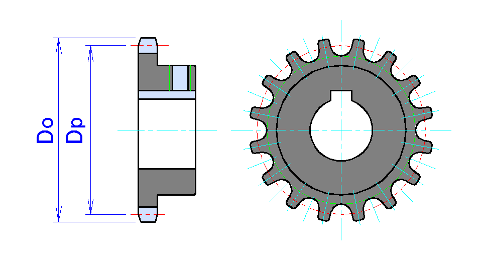 Do：スプロケット外径、Dp：ピッチ円径投稿者が作成スプロケット(16T)の概略図from japanese wiki 画像:Sprocket16.png